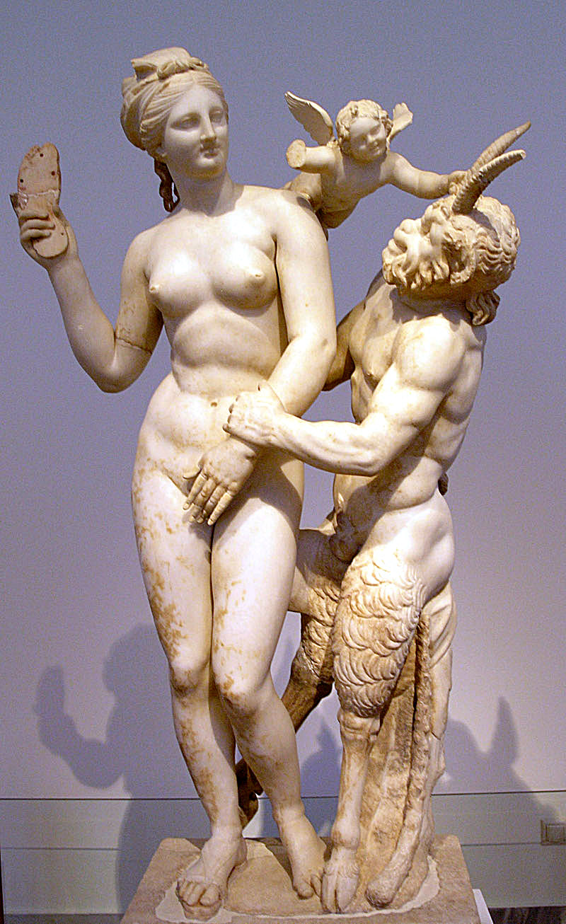 Groupe statuaire d'Aphrodite, Pan et Éros, en marbre parien, trouvé dans la Maison des Poséidoniastes de Beyrouth à Délos. Des traces de peinture sont encore visibles en de nombreux endroits. L'inscription de la base indique que le groupe fut dédié par Dionysios de Beyrouth (Beryttos) à ses dieux ancestraux. Vers 100 a. C. Musée archéologique national, Athènes, n°3335.